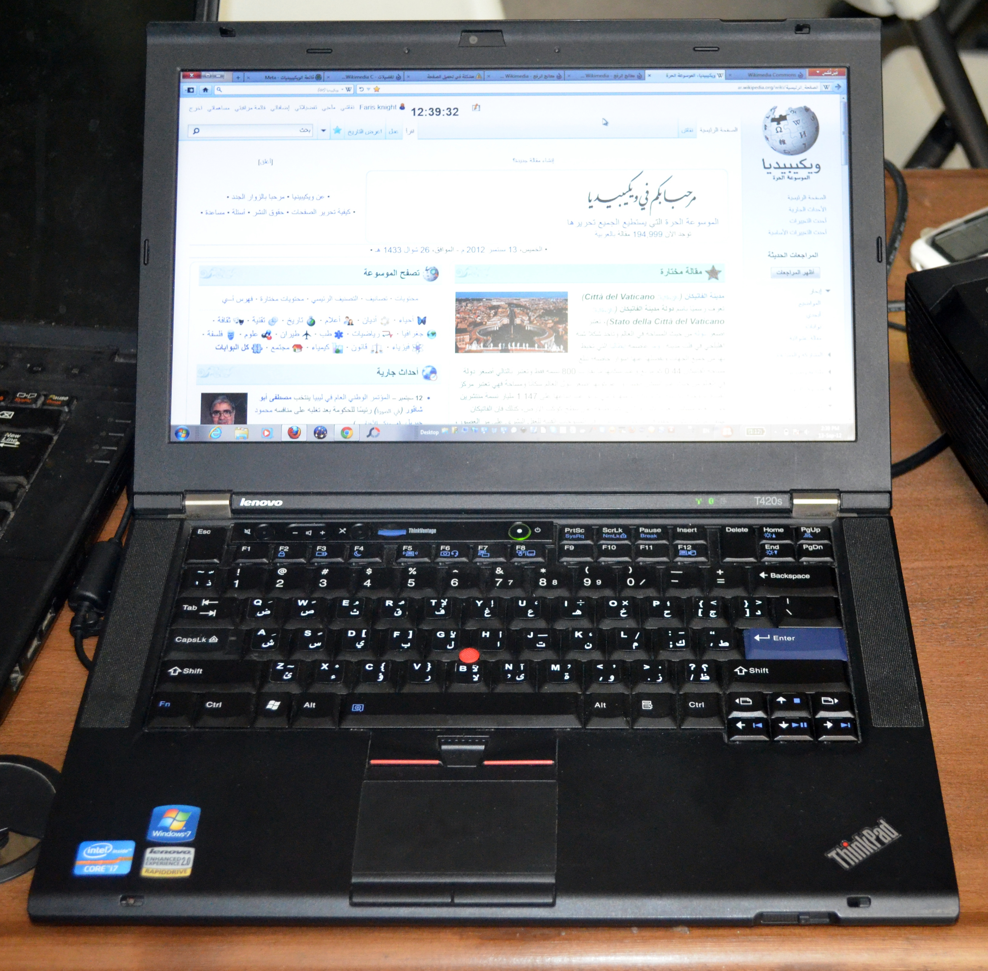 ورشة العمل الخاصة بسفراء الجامعة المحترفين كجزء من مشروع سفراء ويكيبيديا في النسخة الثانية من برنامج ويكيبيديا للتعليم (سبتمبر 2012 - يناير 2013)